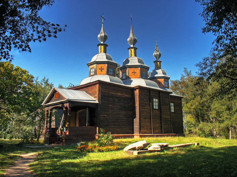 Трьохсвятительська церква з с.Пiщики Сквирського району